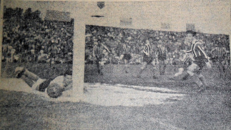 Partido del 7 de octubre de 1956, Rosario Central 9-Chacarita Juniors 2. Gol del Alberto Dolores Sánchez, colocando el 1-0 para Central.